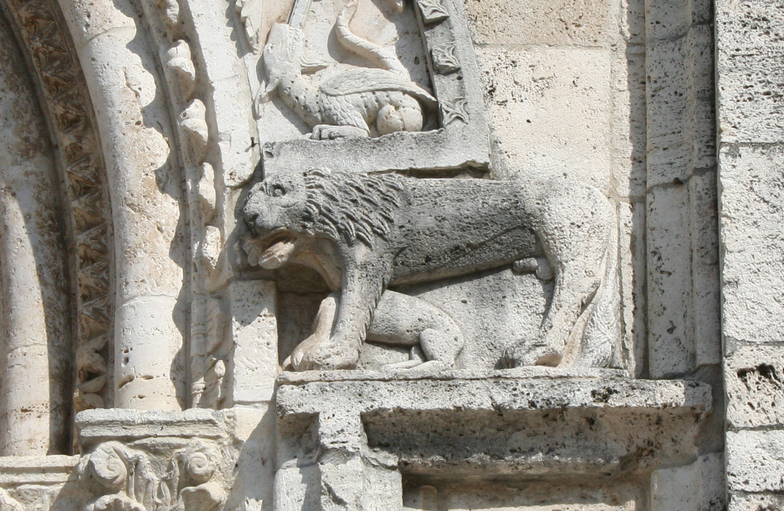 Leoncino scolpito alla base dell'imposta dell'arco della chiesa dei Santi Vincenzo e Anastasio di Ascoli Piceno.